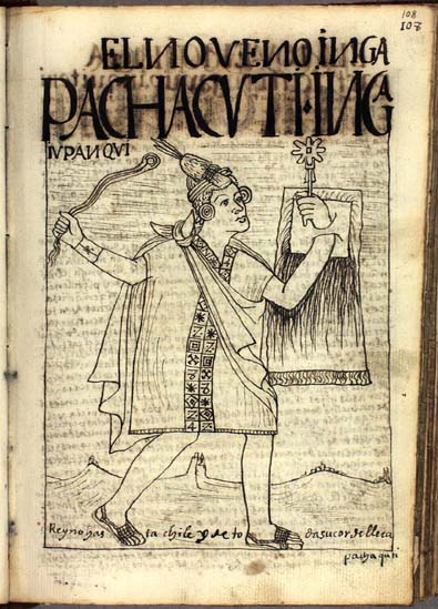 Illustration from the book El primer nueva corónica y buen gobierno